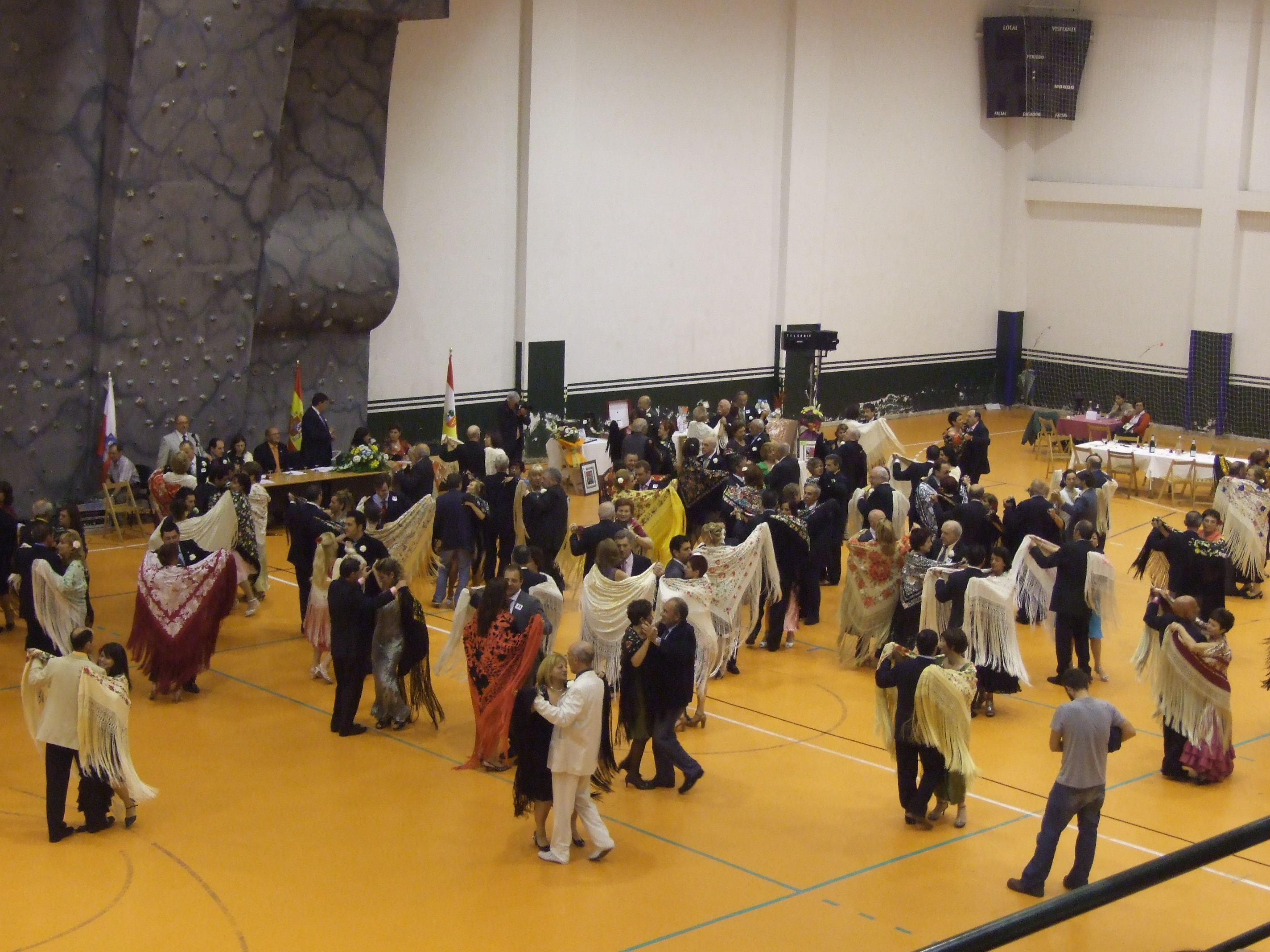 Verbena del Mantón en Ramales de la Victoria This is a photography of a Folklore festival in Spain (Wikidata id Q23657189).